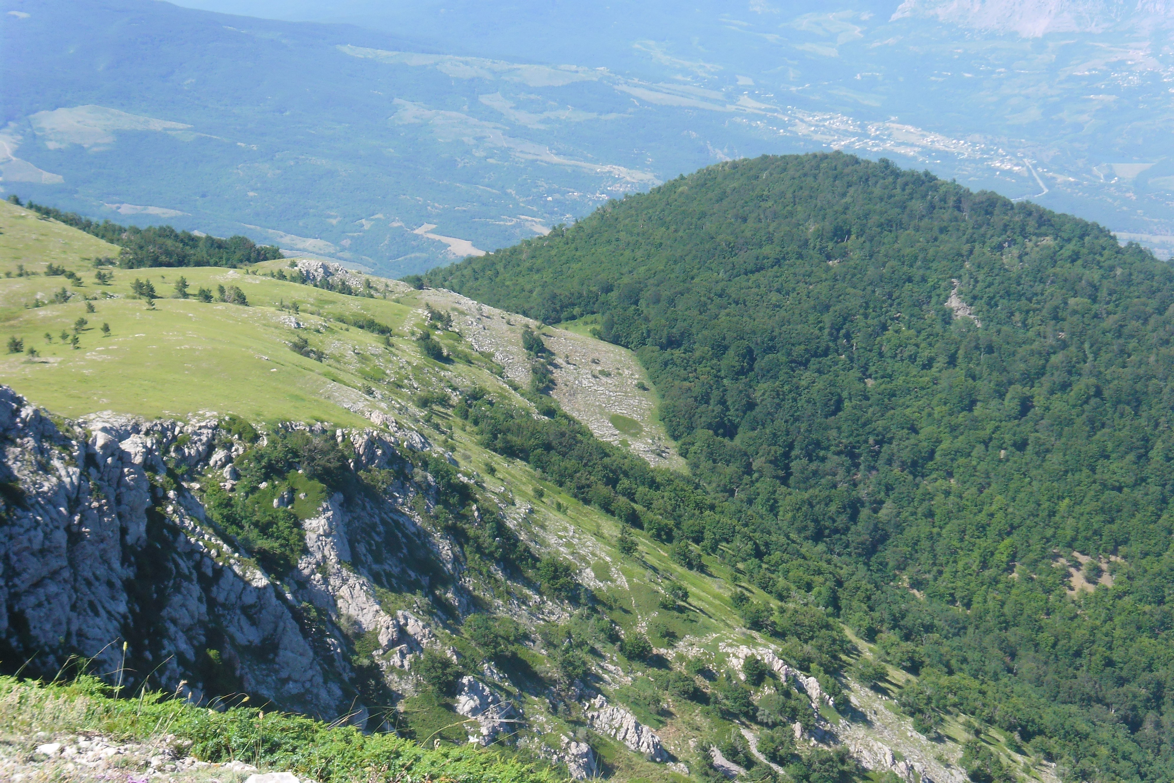 Дипло. Вид з Куш-Кая